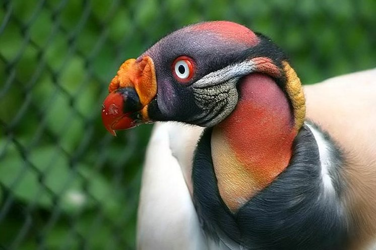 Königsgeier (Sarcoramphus papa)